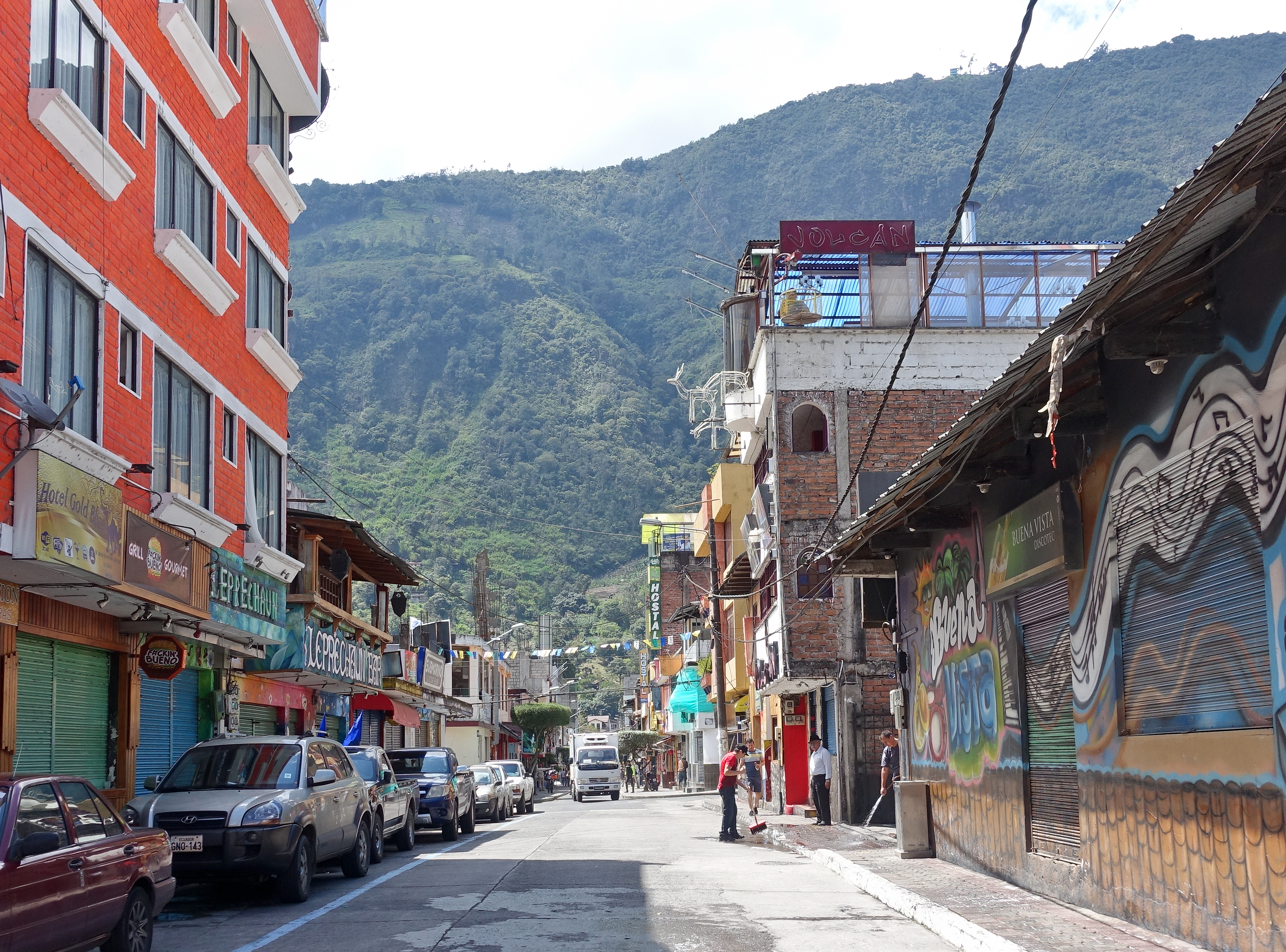 Straße in Baños de Agua Santa, Provinz Tungurahua